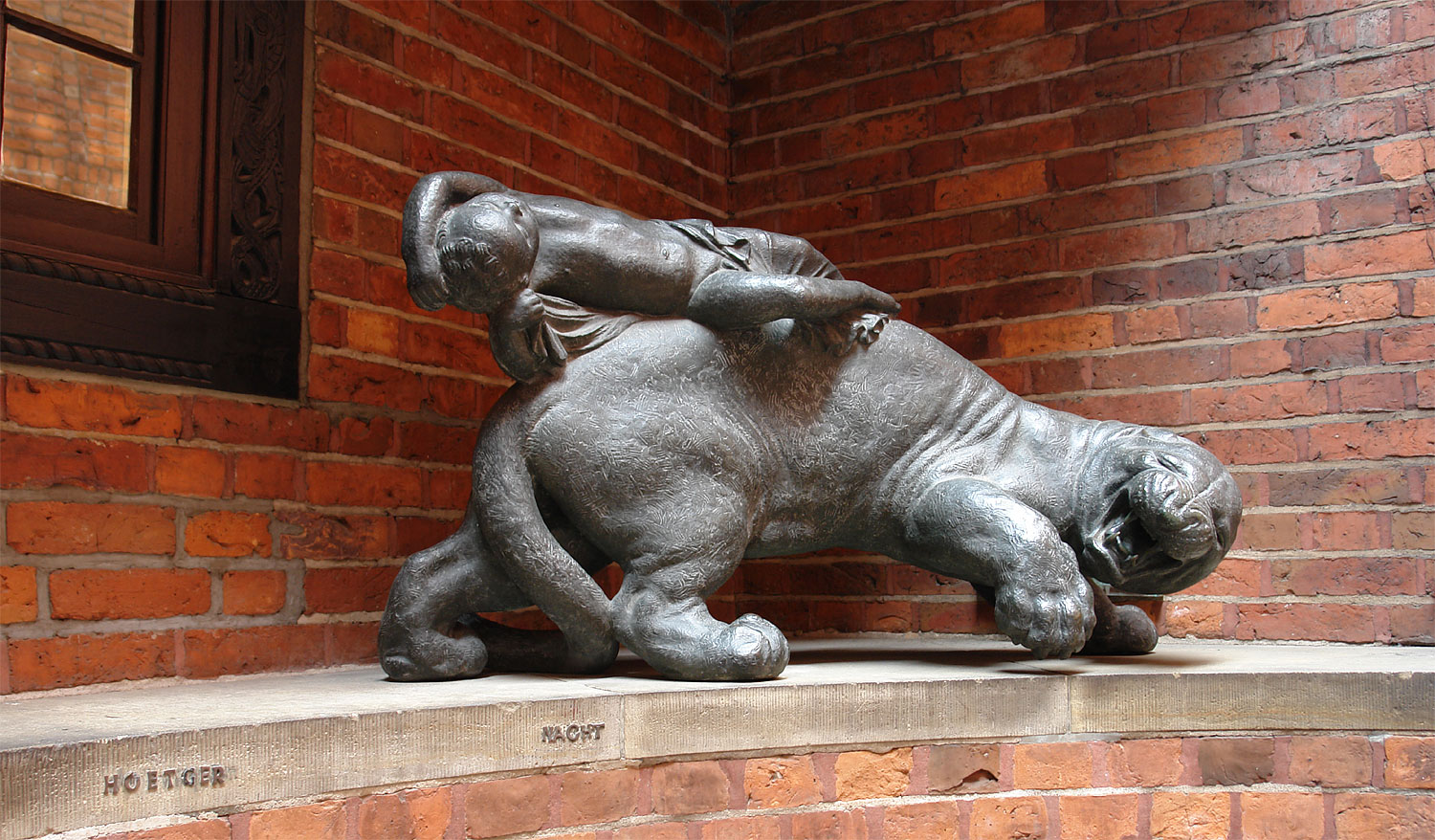 Bernhard Hoetger: Panther, die Nacht tragend (1912, Bronze). Standort: Böttcherstraße Das abgebildete Objekt ist ein geschütztes Kulturdenkmal in der Freien Hansestadt Bremen, mit der Nr. 1497,T001 beim Landesamt für Denkmalpflege registriert.